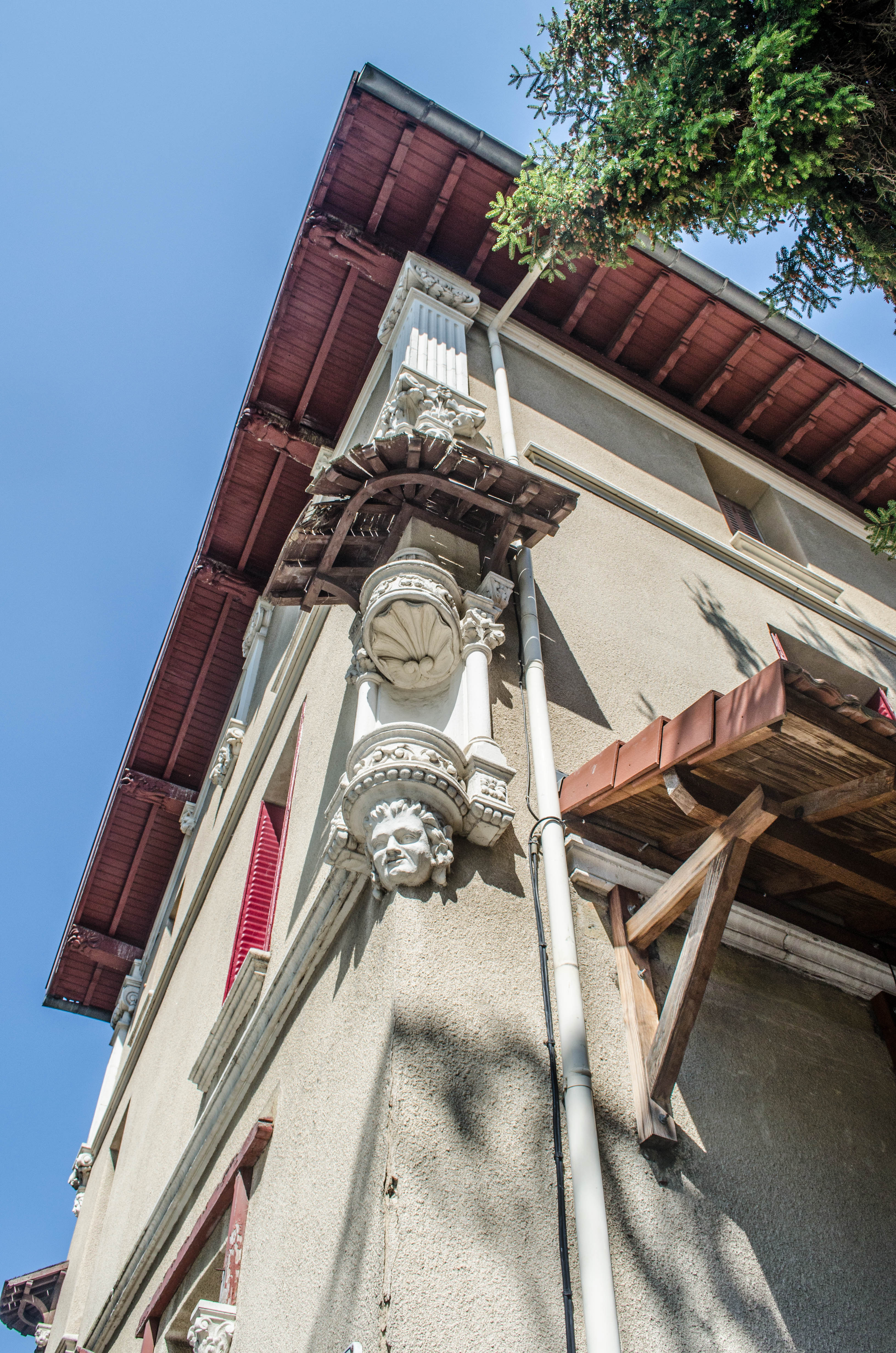 Valence (Drôme, France), cité des Officiers, par Casimir Genest (1846-1918), décor d'angle